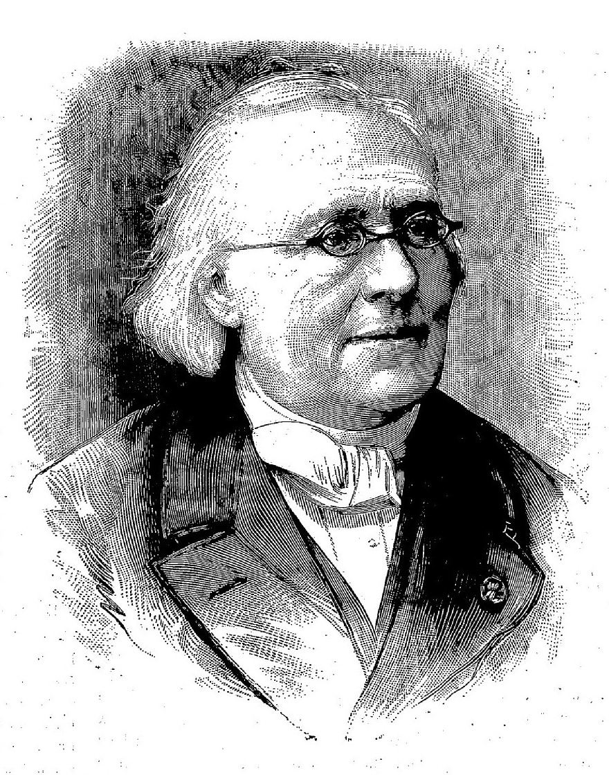 Ernest Havet de l'Académie des Sciences morales et politiques, (Photographie Eugène Pirou)